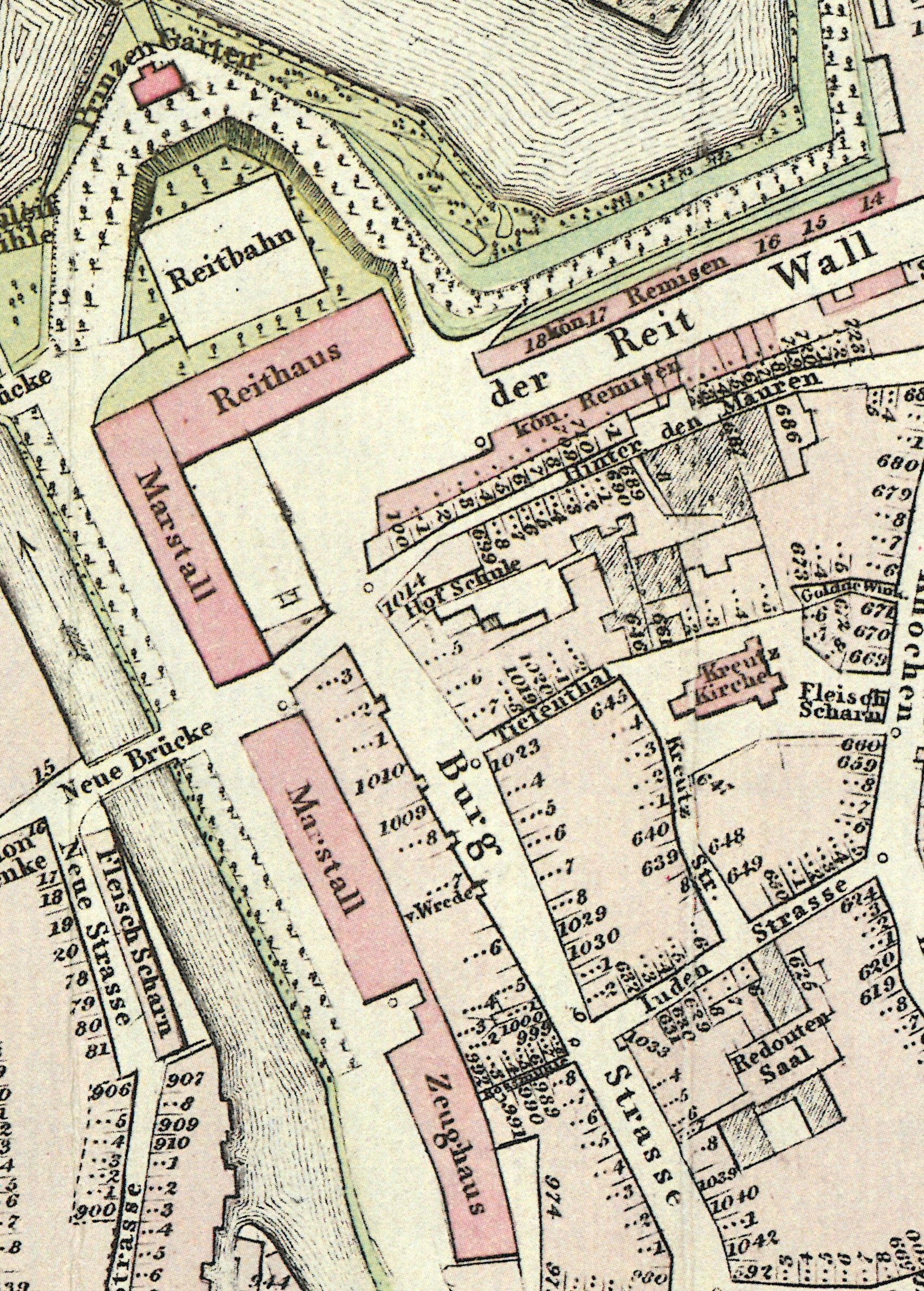 Ausschnitt des von dem Ingenieurmajor Georg Wilhelm Müller bearbeiteten, von dem Kupferstecher Wagner gestochenen und von dem Kupferstichdrucker Johann Georg Erdinger gedruckten „Plans der Residenzstadt Hannover, mit Angabe der Hausnummern, 1822“ Wasserflächen wurden nachträglich blau koloriert